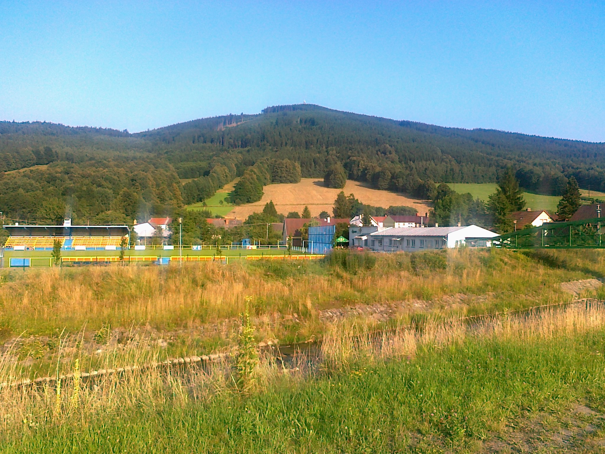 Widok na górę Zlatý Chlum